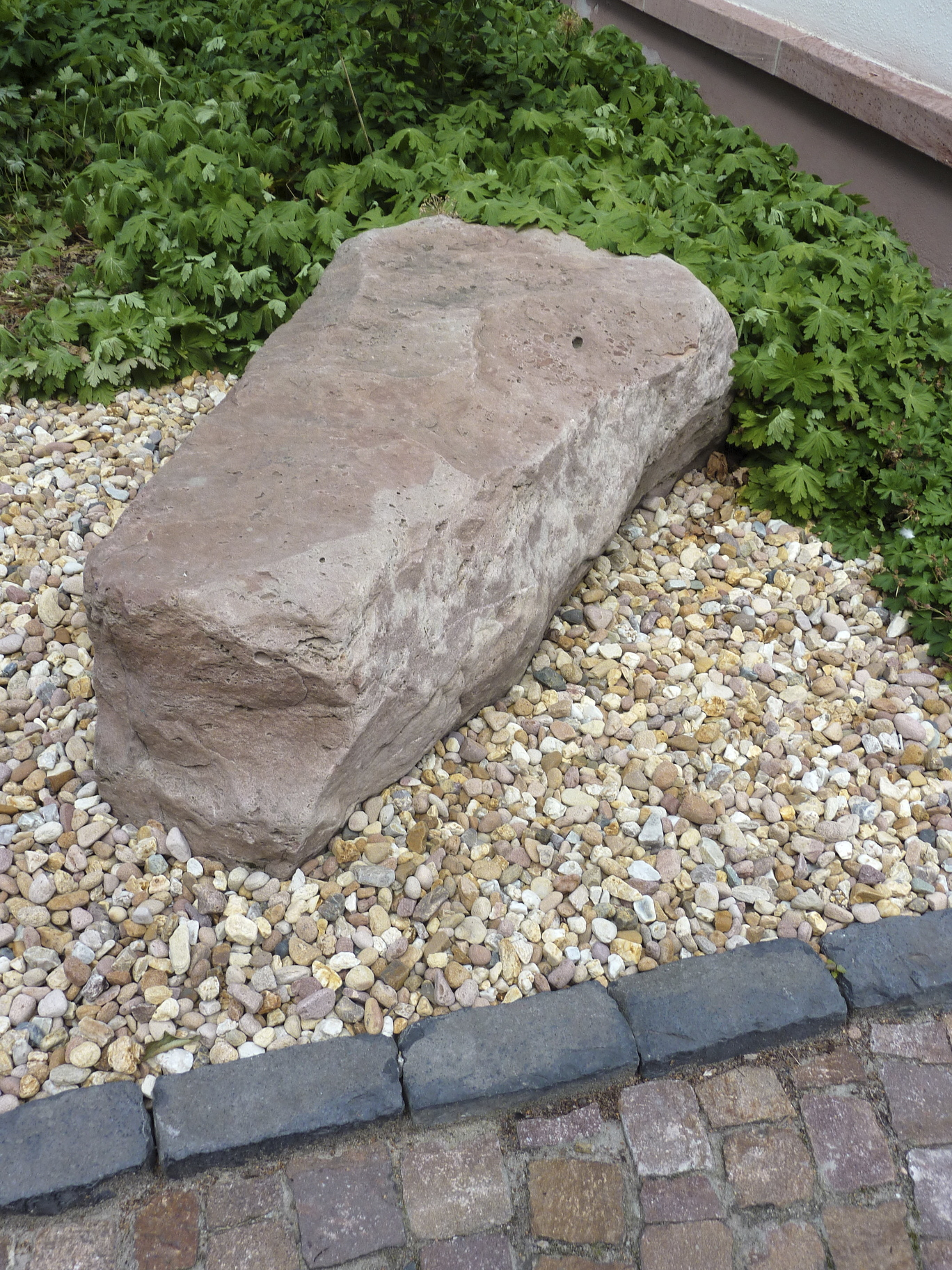 Frankfurt am Main, Stadtteil Schwanheim: Im Schulgebäude aus dem 19. Jahrhundert befindet sich seit 1973 das Heimatmuseum Schwanheim. Das Haus stellt Exponate von der Vor- und Frühgeschichte bis zum 20. Jahrhundert aus. Das Foto zeigt einen Findling im Innenhof des Museums